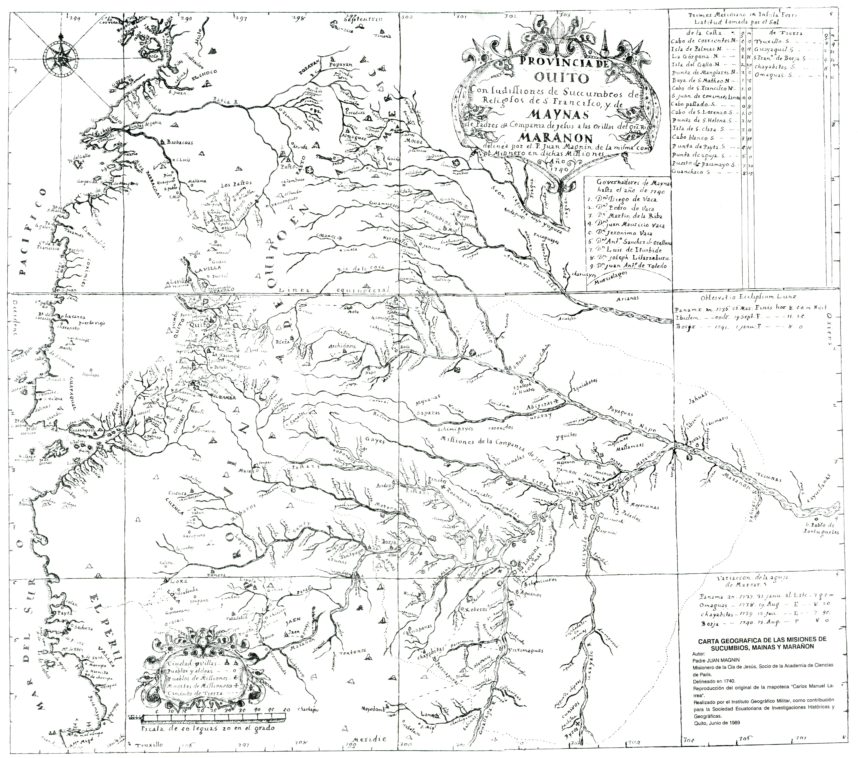 Diapositiva de Consulta y acceso publico cuya información fue investigada de un libro y/o ejemplar de revisión custodiado en los Fondos Bibliográficos (Sección Siglo XVIII o Etapa Colonial) del Archivo Histórico del Guayas; Guayaquil, Ecuador.Consultado y compartido por el usuario J. Javier García A.